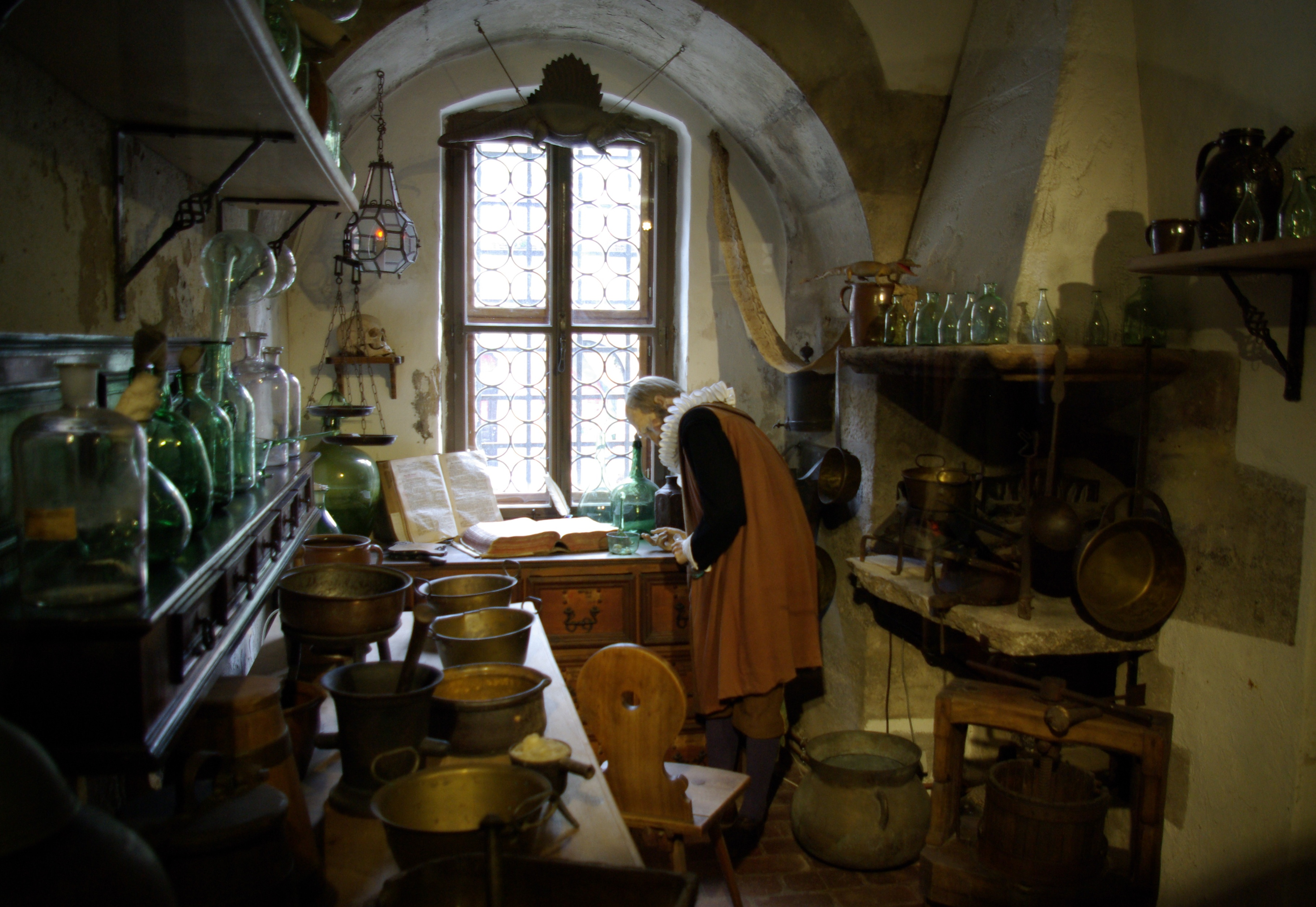 Nachbildung des Philosophen, Arztes und Chemikers Andreas Libavius im Historiengewölbe im Rathaus von Rothenburg ob der Tauber